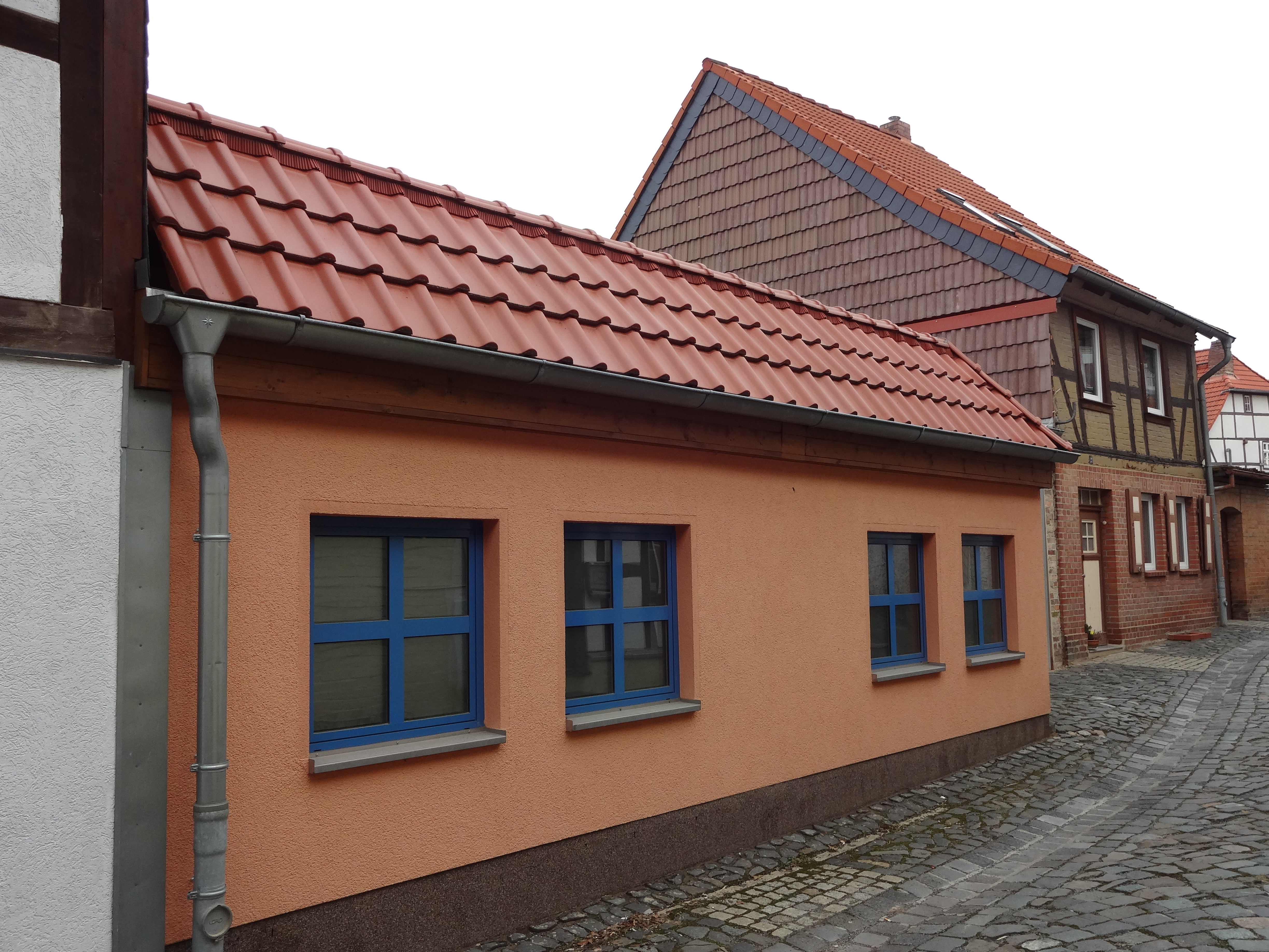 denkmalgeschütztes Fachwerkhaus in der Obermauerstraße 4 in Derenburg, Ortsteil von Blankenburg (Harz)